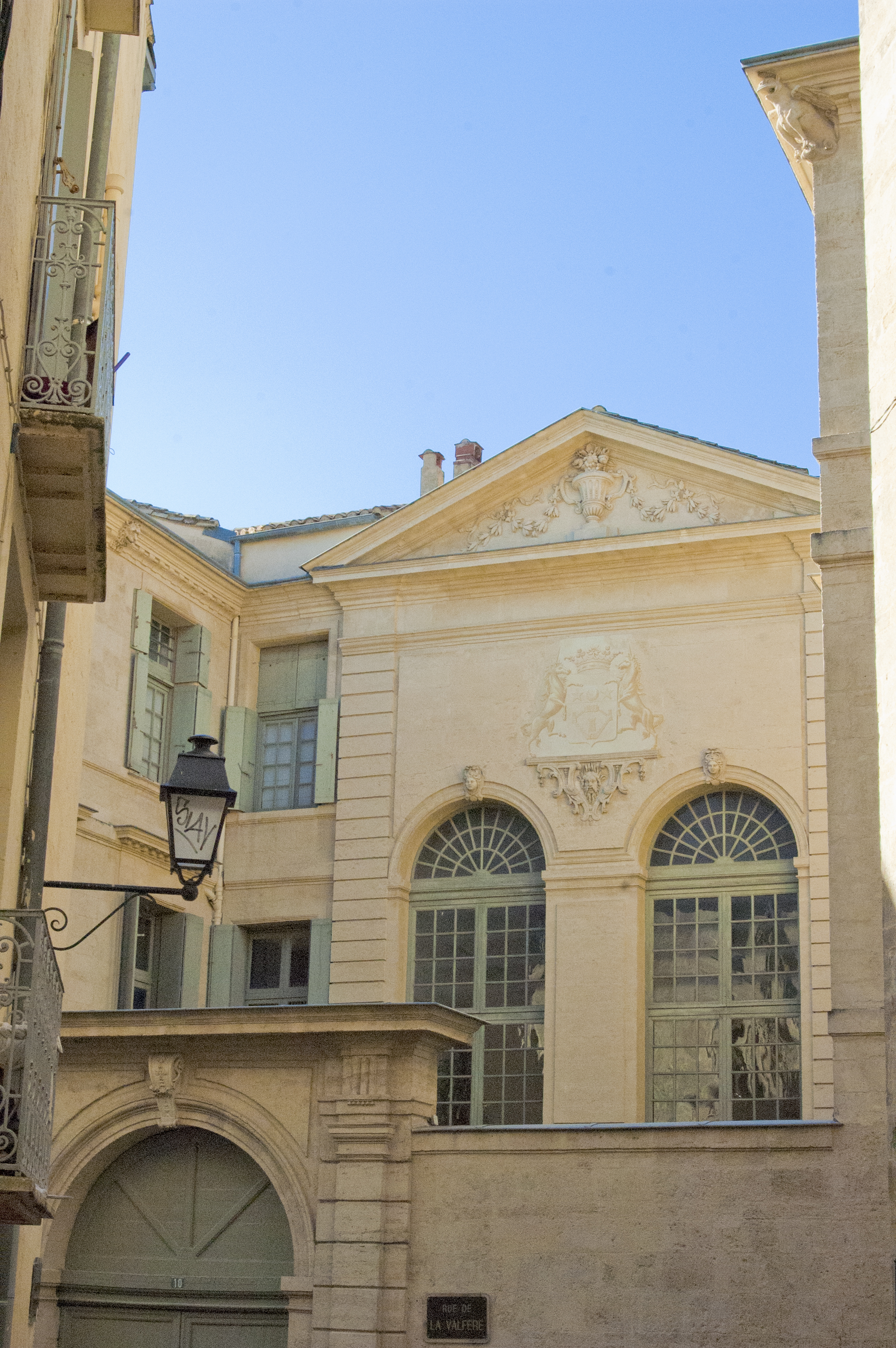 Entrée principale de l'Hôtel de Lunas.